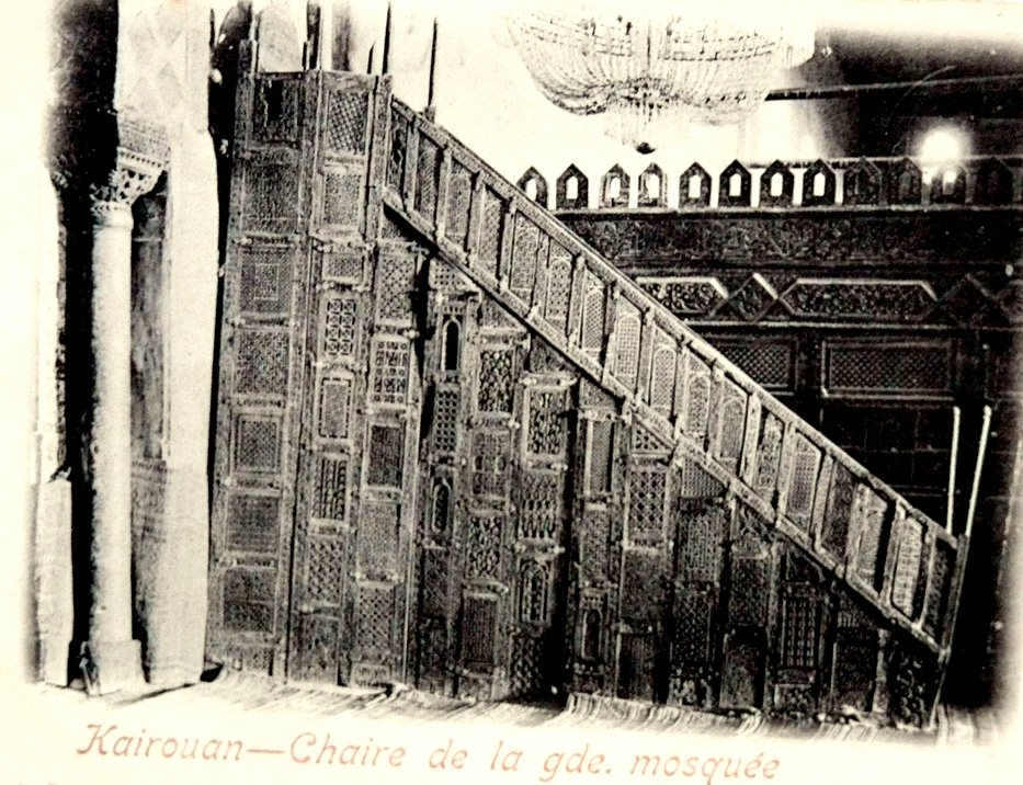 Hauptmoschee von Kairouan. Minbar und Maqsura. Historische Postkarte um 1900 Original im Privatbesitz: Orientalist